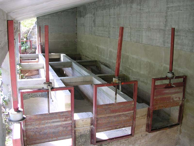 Dissabbiatore che si incontra salendo dalle opere di presa dell’acquedotto di Saint Vincent verso il ru de Marseiller. Valle d'Aosta, Italia.